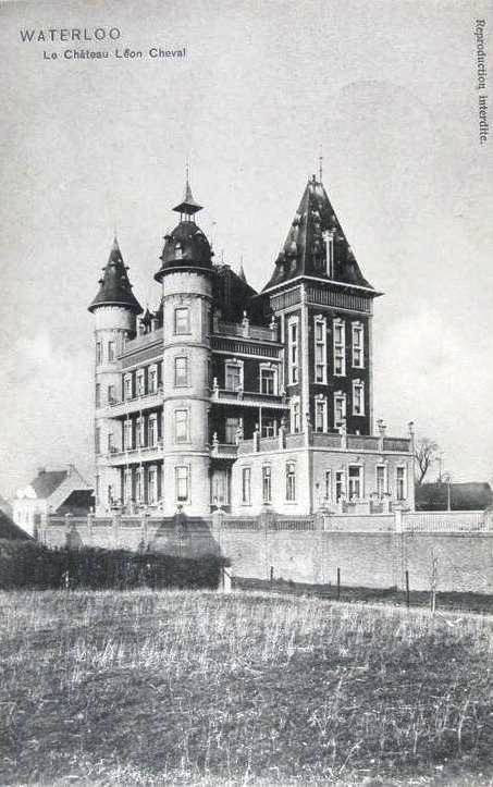 Le château de l'industriel Français Léon Cheval (producteur d'engrais chimique). Carrefour de la N5 et N27 à Waterloo, Belgique. Démoli en février 1966.